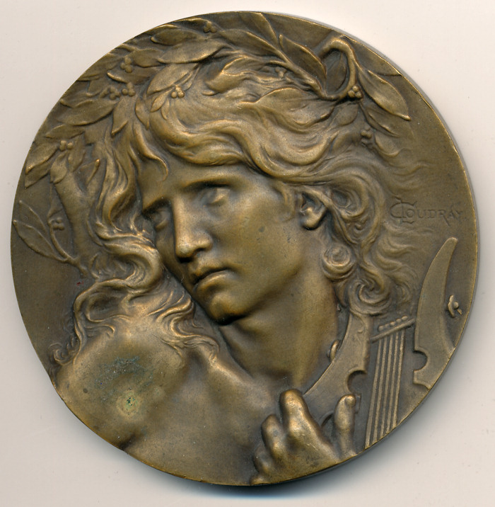 Orphée endort Cerbère aux sons de sa lyre par Lucien Coudray, oeuvre avec laquelle il obtient le Grand Prix de Rome en 1893, bronze, 68mm - Avers